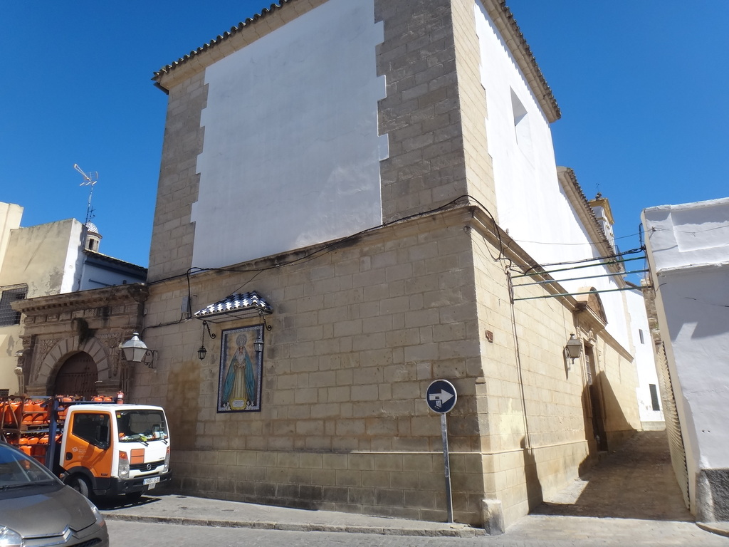 Convento de Santa María de Gracia, Jerez de la Frontera (Andalucía, España)